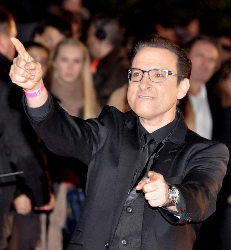 Jean-Marc Généreux aux NRJ Music Awards